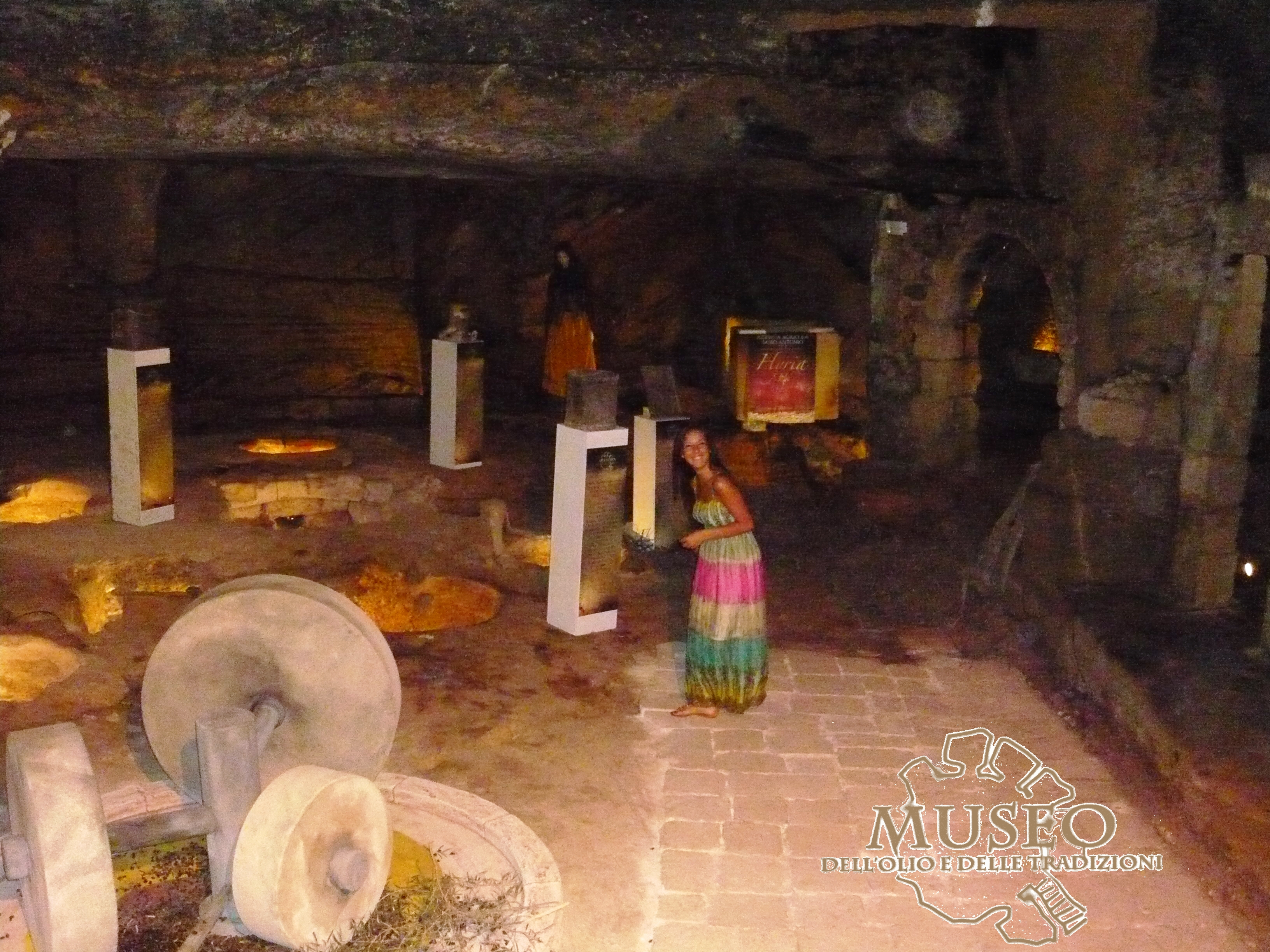 INTERNO-Frantoio Ipogeo- Museo dell’ Museo dell’Olio e delle Tradizioni-ORIA (BR)-ITALY